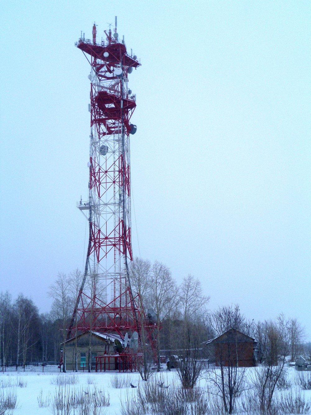 Фото радиотелевизионной станции в городе Стрежевой Томской области